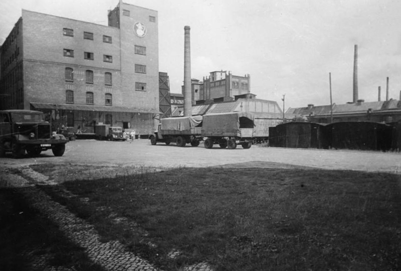 Berlin, Kaiser's Kaffee Fabrik Kohlennot in den westlichen Sektoren Berlins. 1948 Die Schornsteine ruhen. Kaiser's Kaffee Geschäft in Spandau. Aufn.: Illus-Kemlein 1947-48